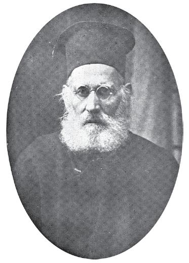 Отец Търпо Поповски от село Косинец, Костурско (1848 - 1928).